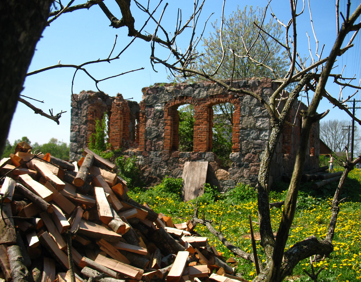 Беларуская (тарашкевіца): Лужкі